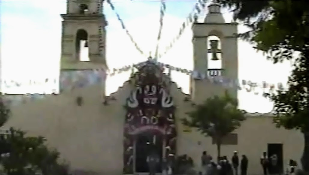 Templo de San Luis Obispo de Tolosa, en San Luis Coyotzingo,Puebla,Mexico.